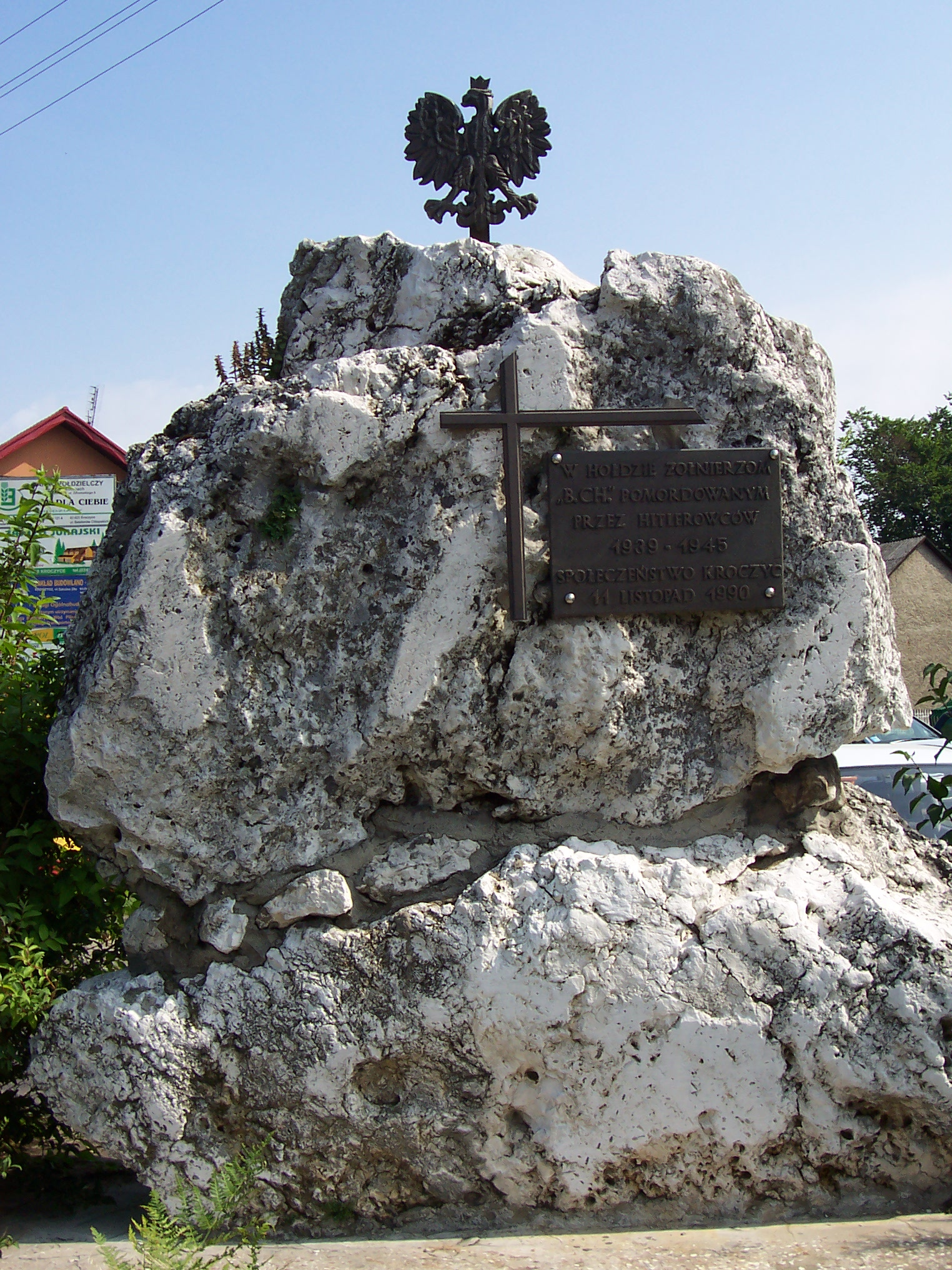 Pomnik upamiętniający poległych żołnierzy Batalionów Chłopskich w Kroczycach